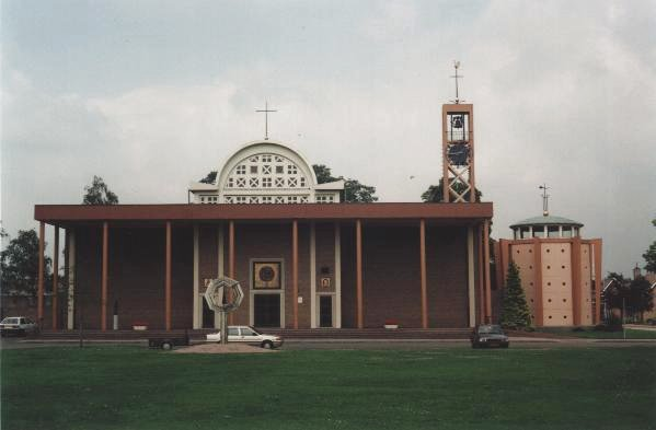 Neerkant, Dorpsstraat 31 - Willibrorduskerk - anno 1957 - Uit eigen prive archief Willem Tijssen